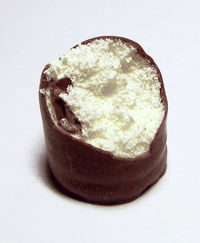 Schokoladenkuss